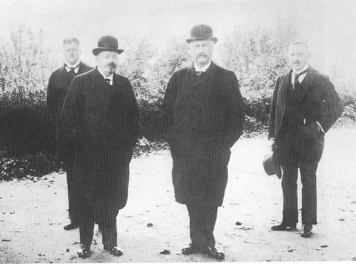 Friedrich Ebert mit Constantin Fehrenbach in Freudenstadt.